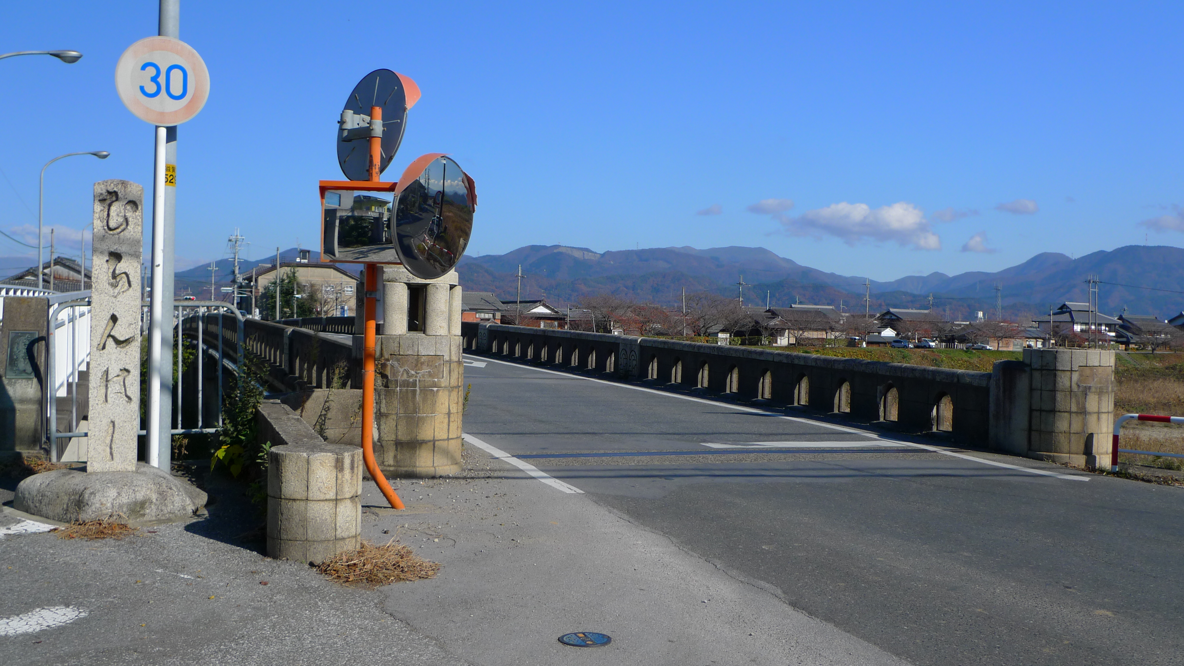 彦根市高宮町無賃橋の画像